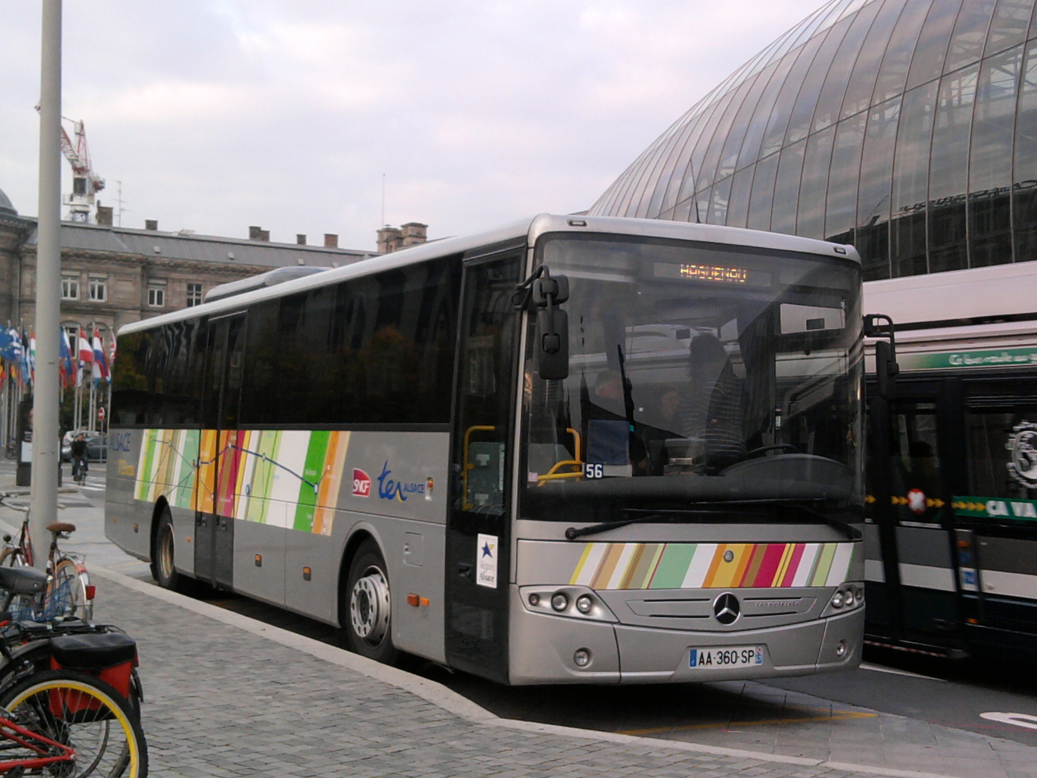 Mercedes-Benz Intouro du TER Alsace sur la place de la Gare, Strasbourg